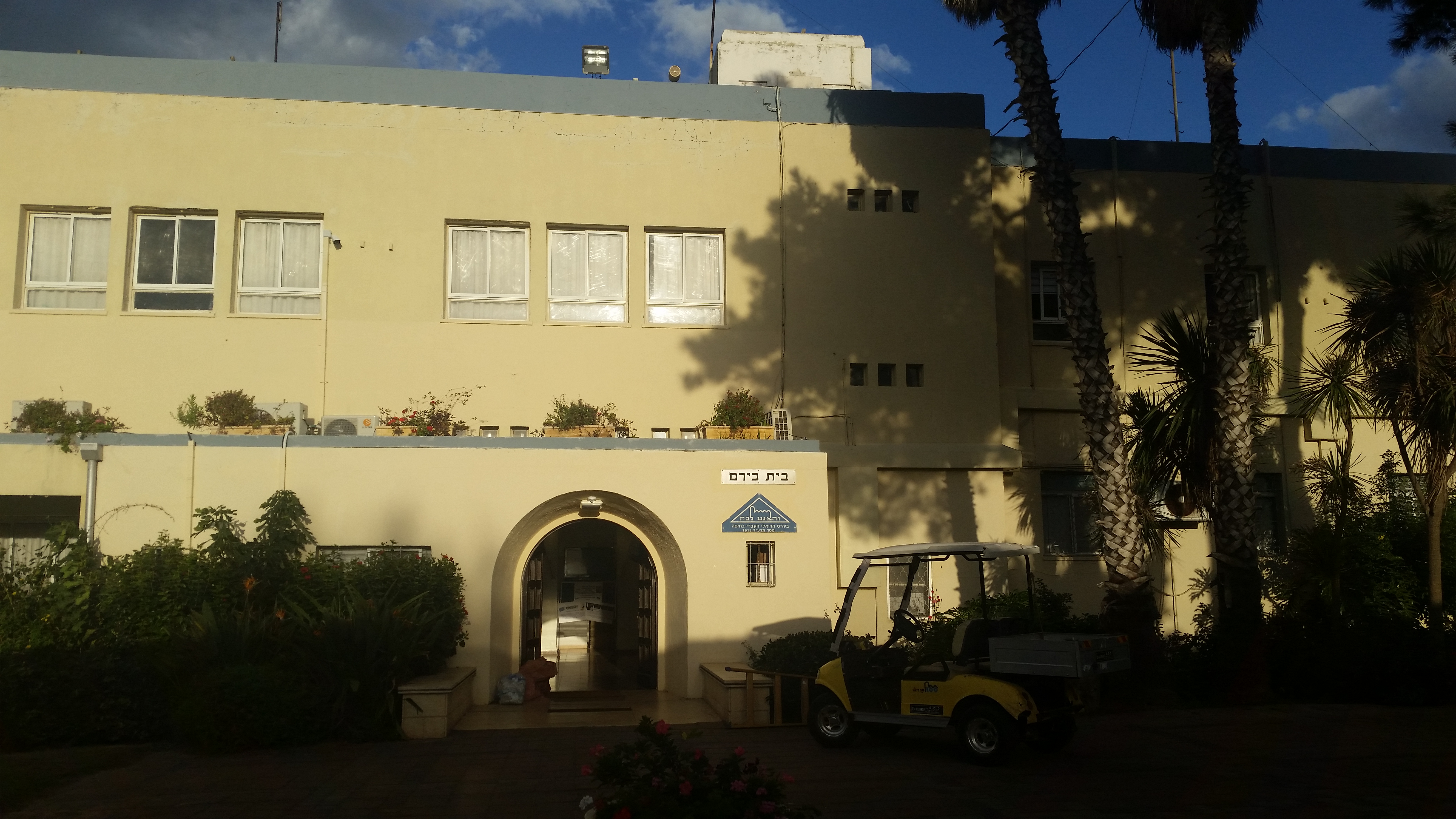 המבנה הראשון שהוקם בקמפוס בית בירם